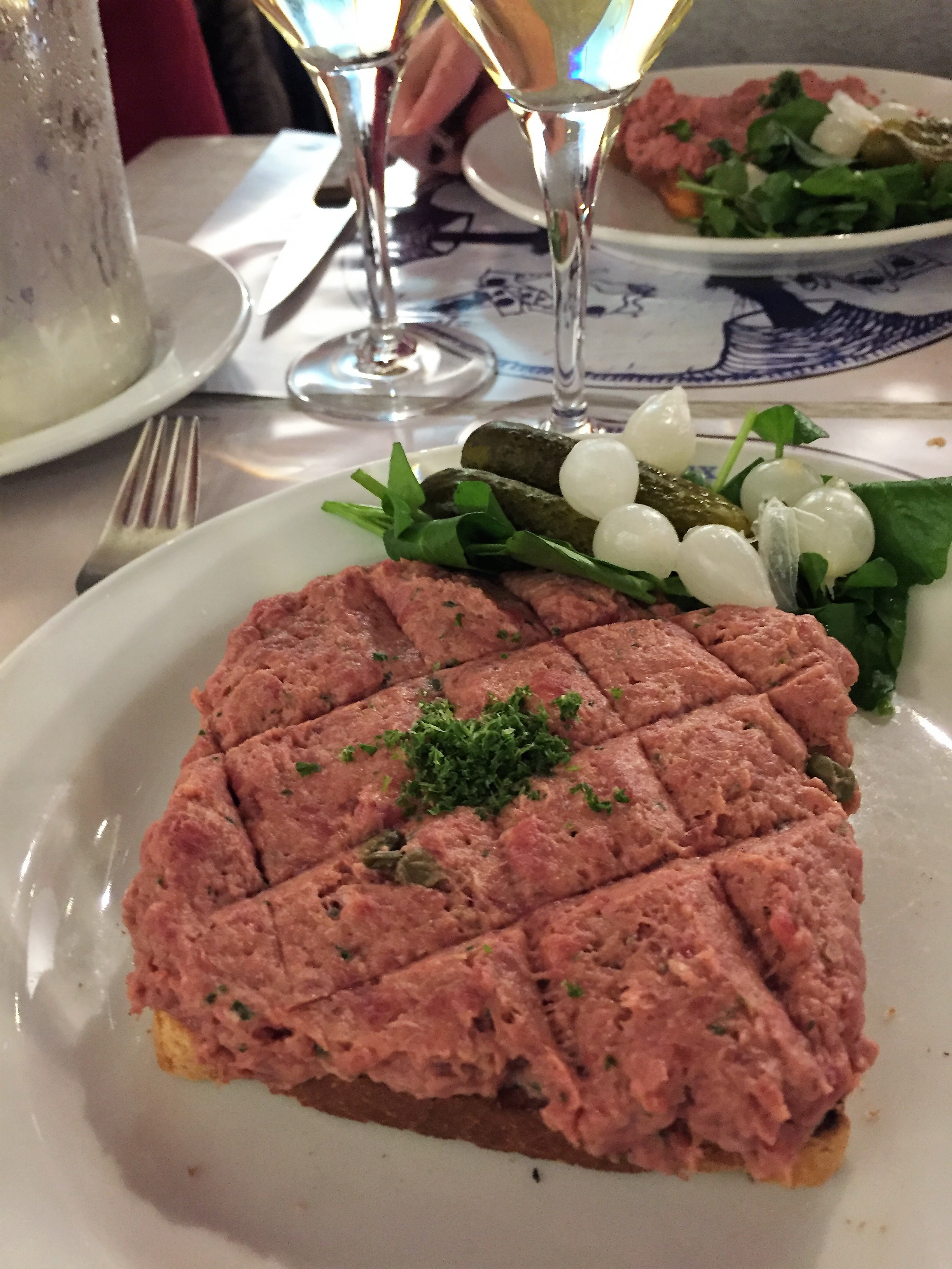 Filet américain (Rindertatar) auf Toastbrot mit gehackter Petersilie, garniert mit Cornichons, eingelegten Zwiebeln und Brunnenkresse, im Restaurant Au Vieux Saint Martin in Brüssel, Belgien.